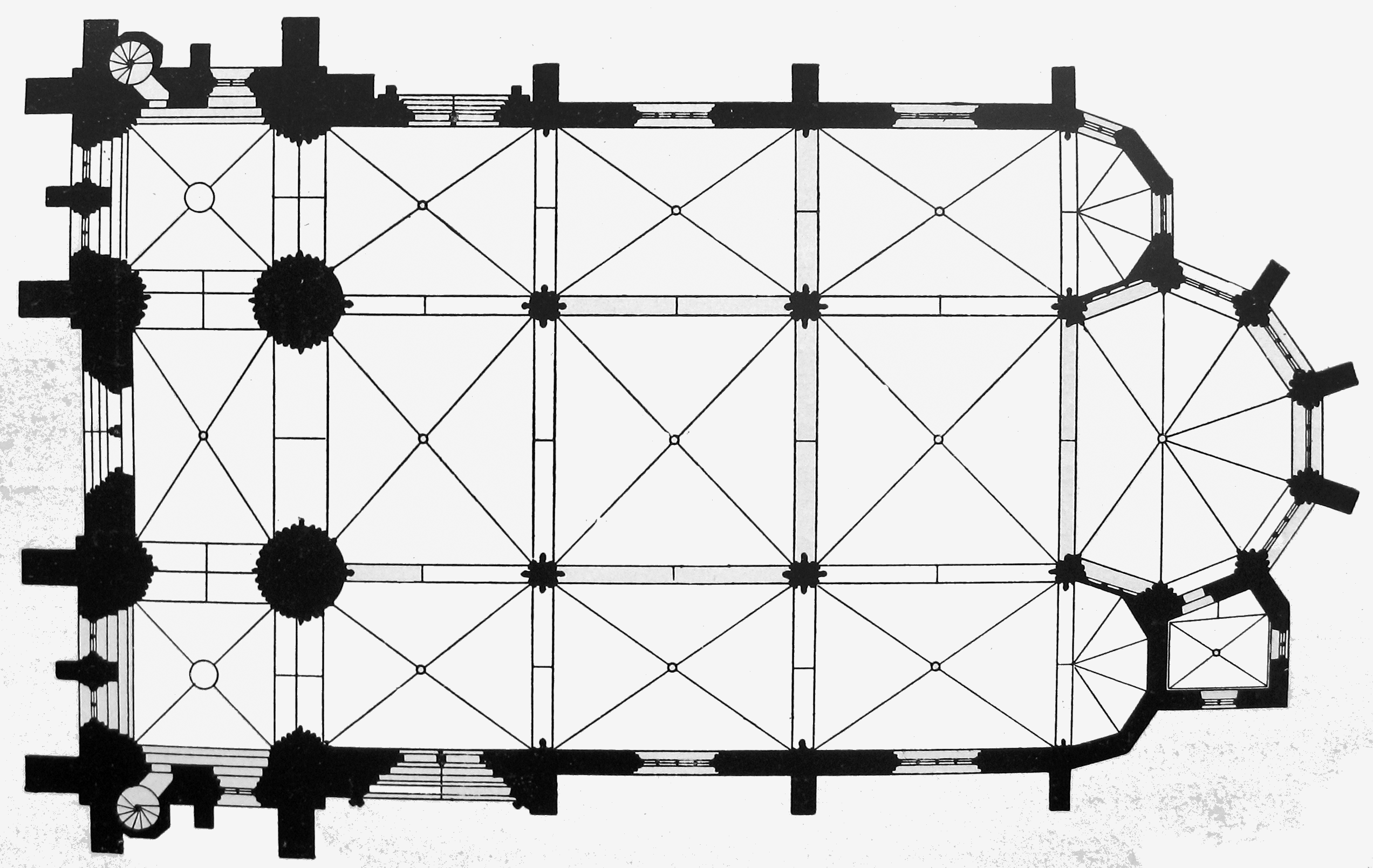 Soest, Maria zur Wiese, evangelisch, gotisch, Grundriss